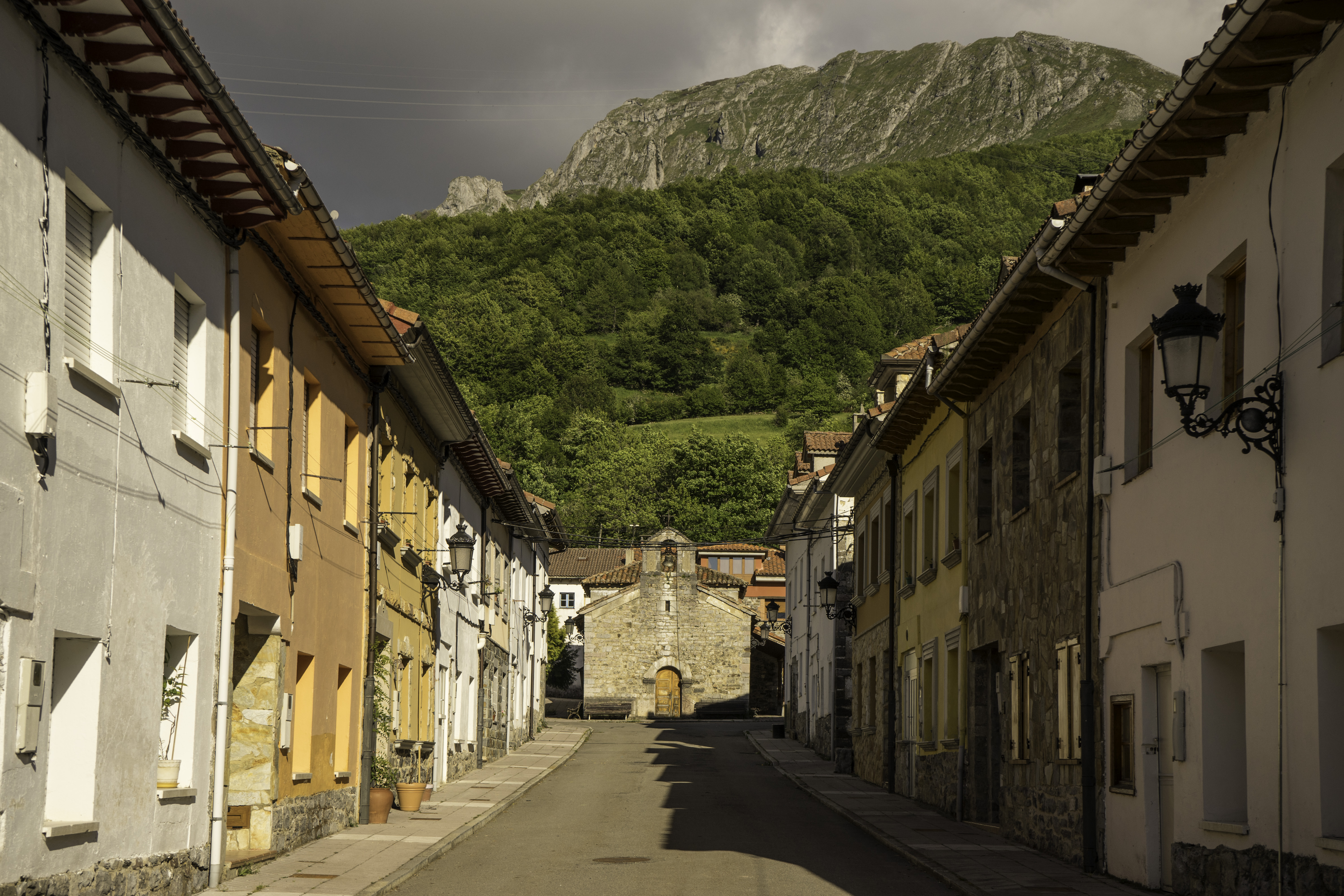 Parque natural de Redes, vista del pueblo de tarna, en la falda del paso que da nombre al pueblo This is a photography of a Special Area of Conservation in Spain with the ID: ES1200008. Natura2000 entry, EEA entry